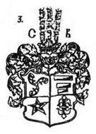 Родавыя гербы XVI i XVII стст. Віленская школа.